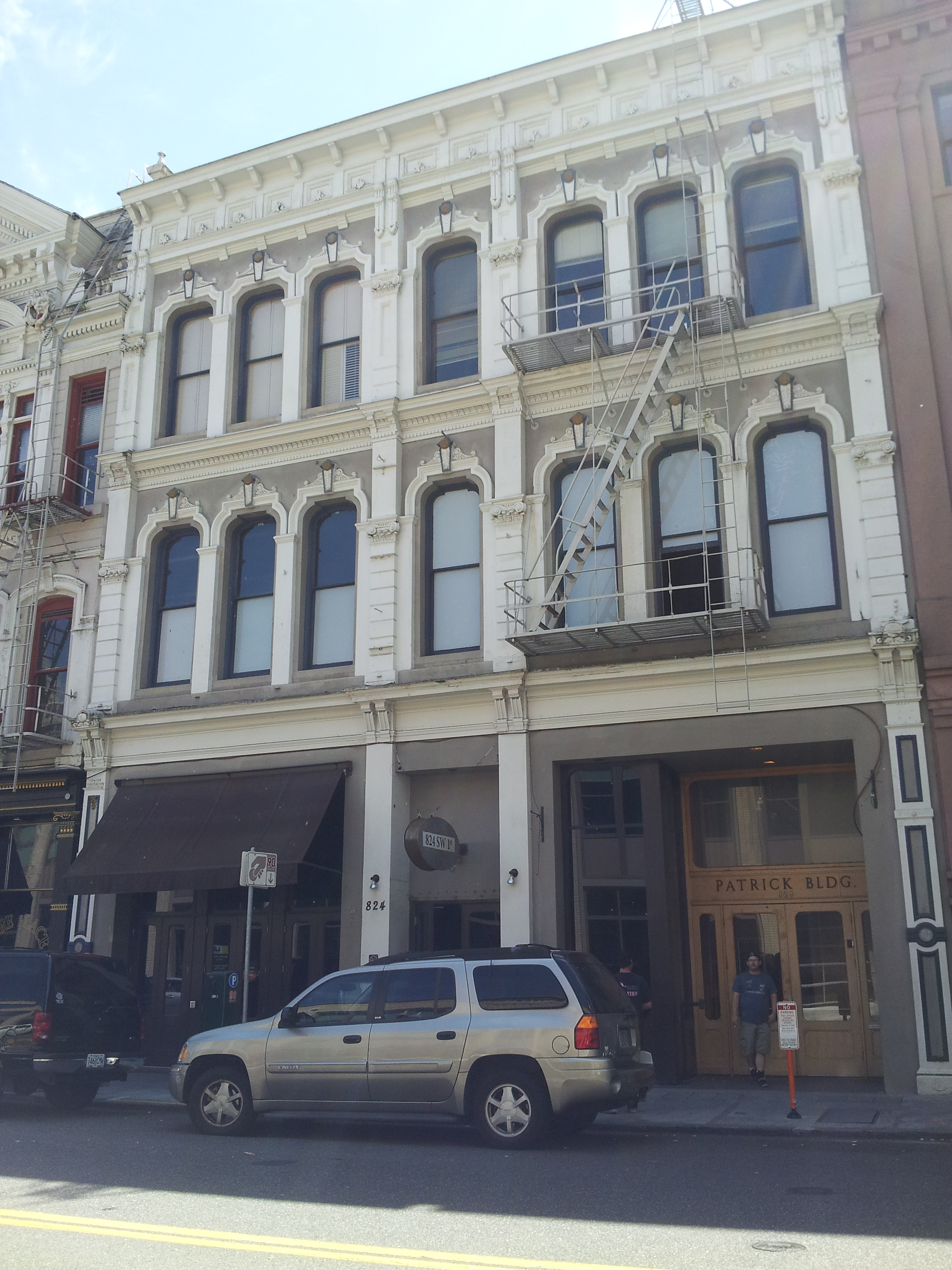 824 SW 1st, Portland, Oregon